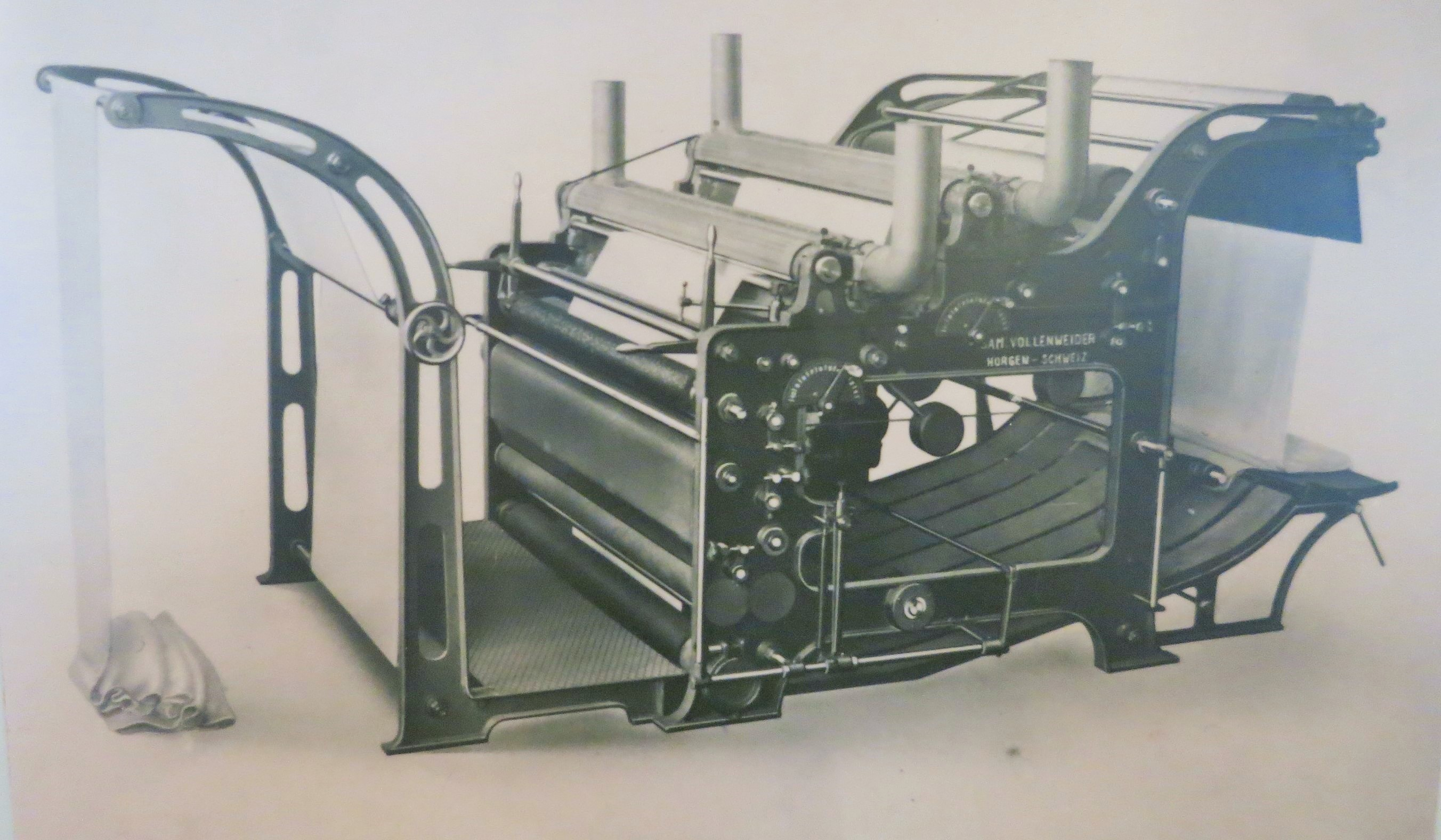 Vollenweider AG, Horgen ZH, Schweiz (Ortsmuseum Sust Horgen)